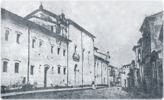 foto do seculo XIX da igreja de são Raimundo